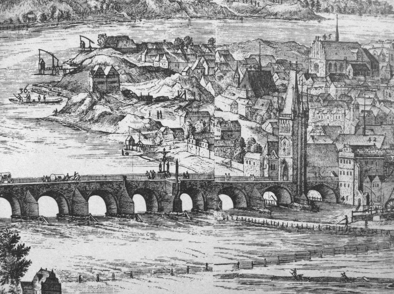 Karlův most, r. 1606